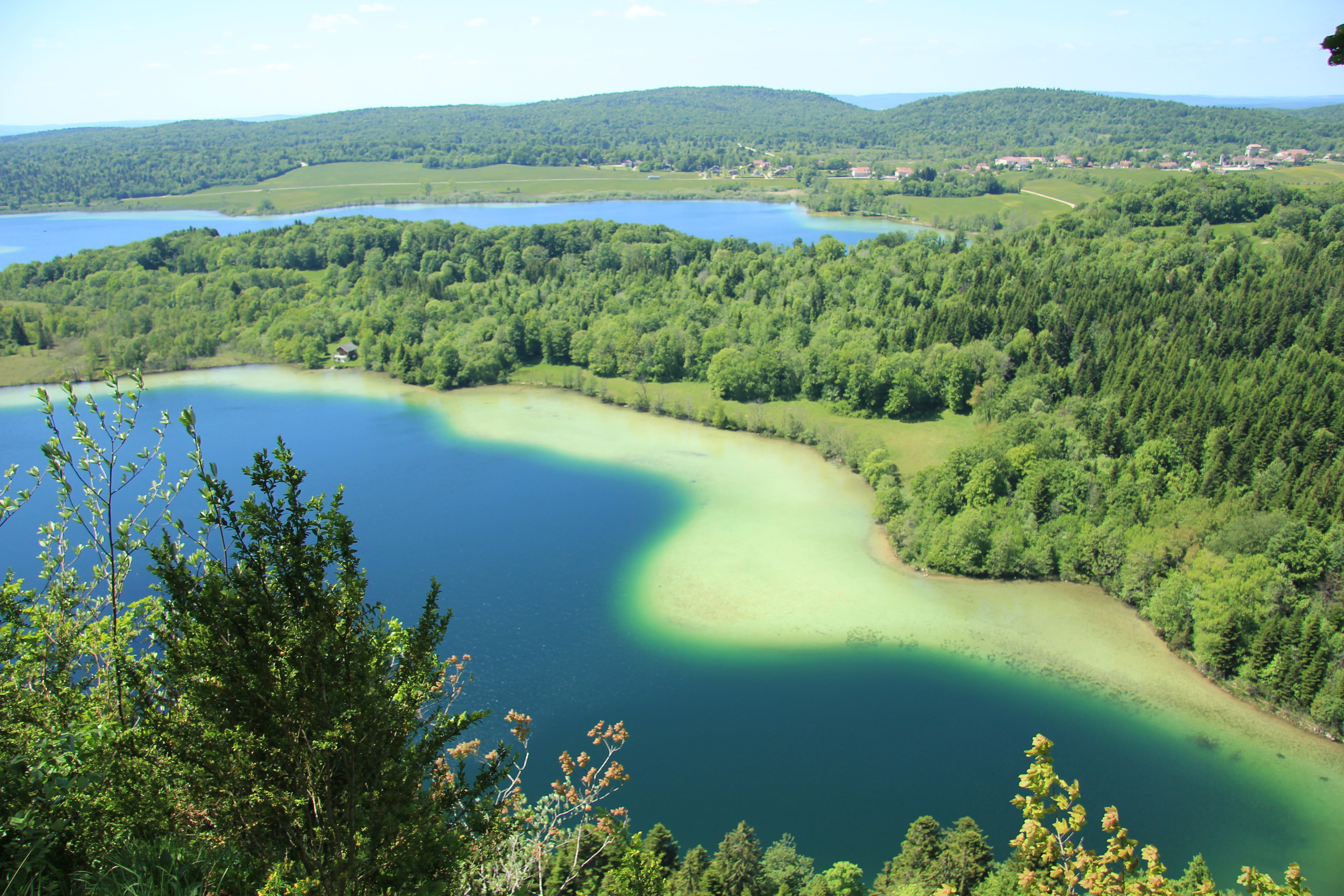 озеро в департаменте Юра, Франция